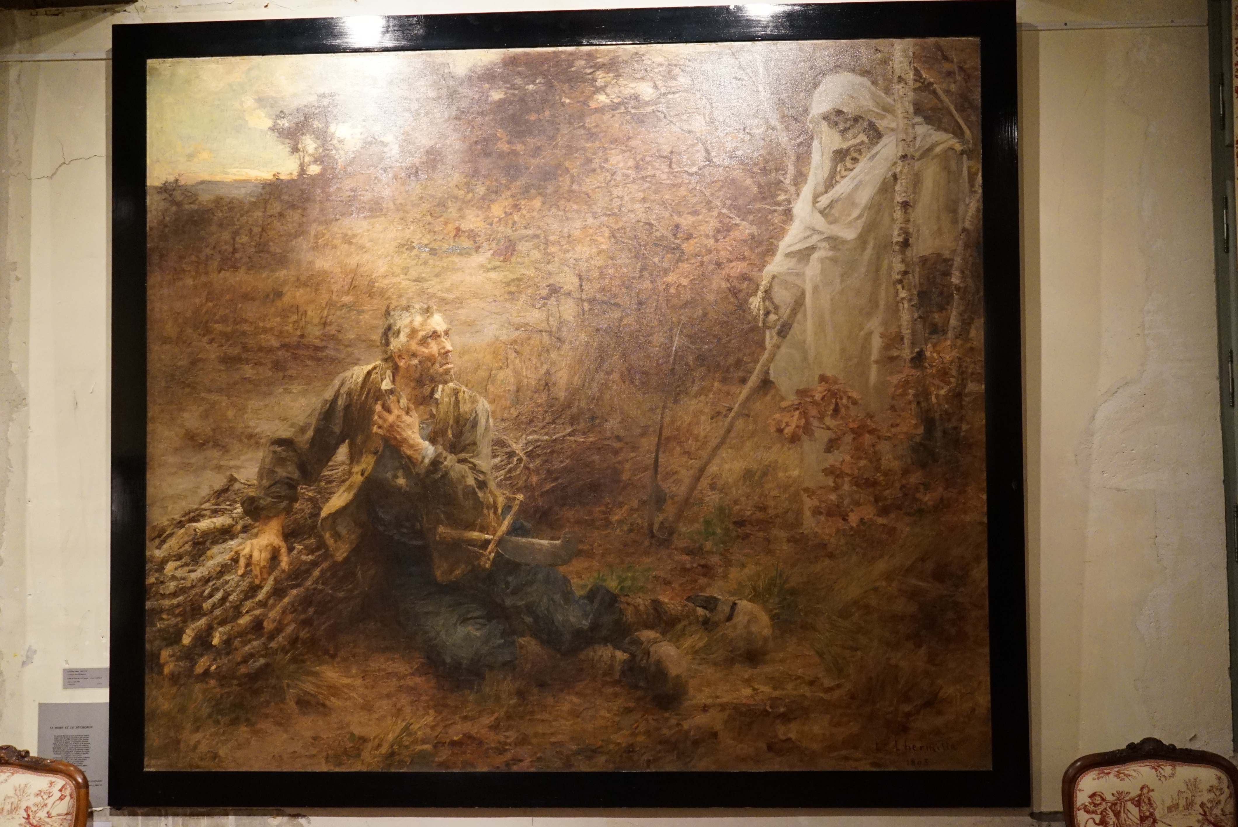 lors de la Nuit européenne des musées.